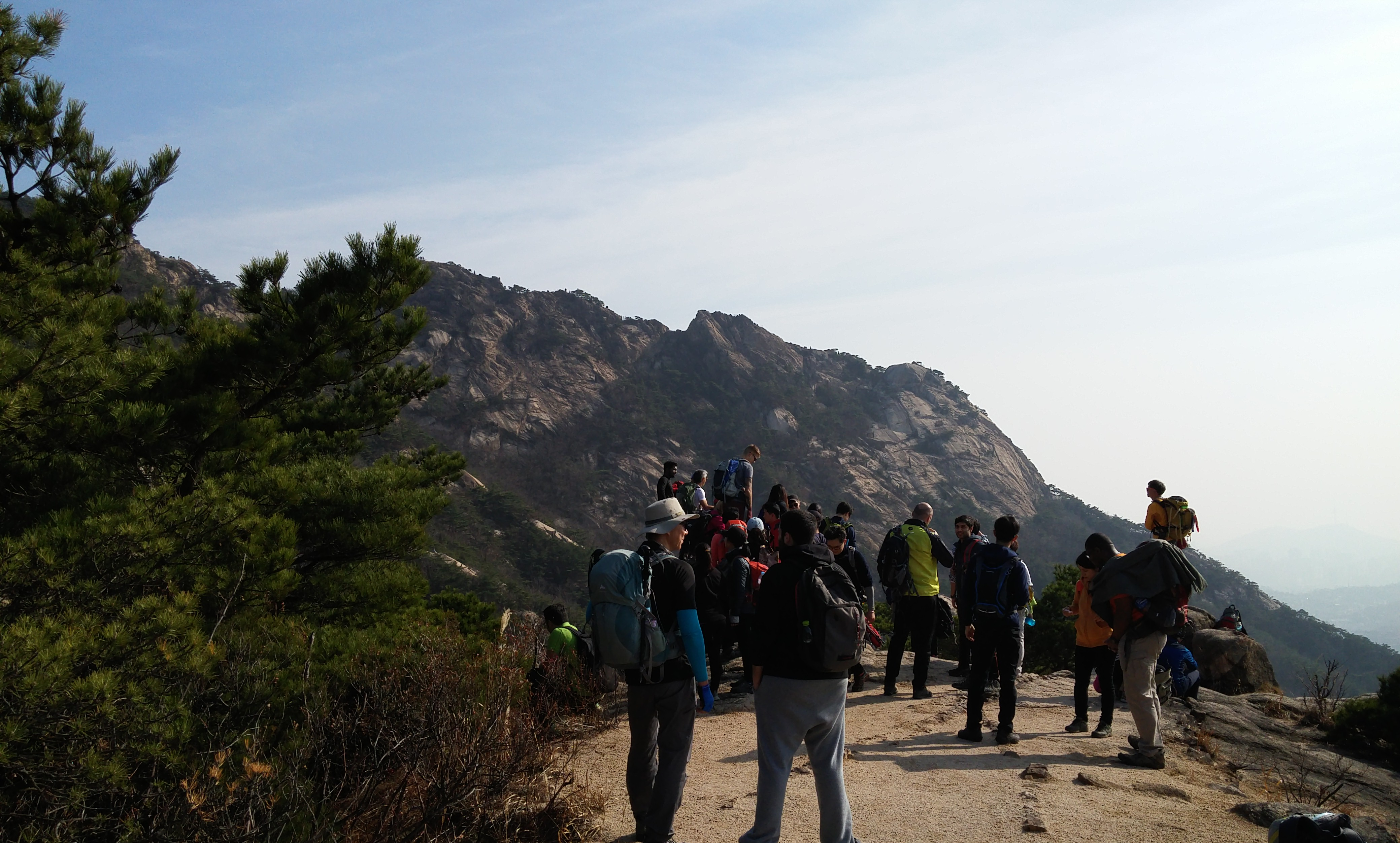 Wanderung und Klettern am Bukhansan bei Seoul